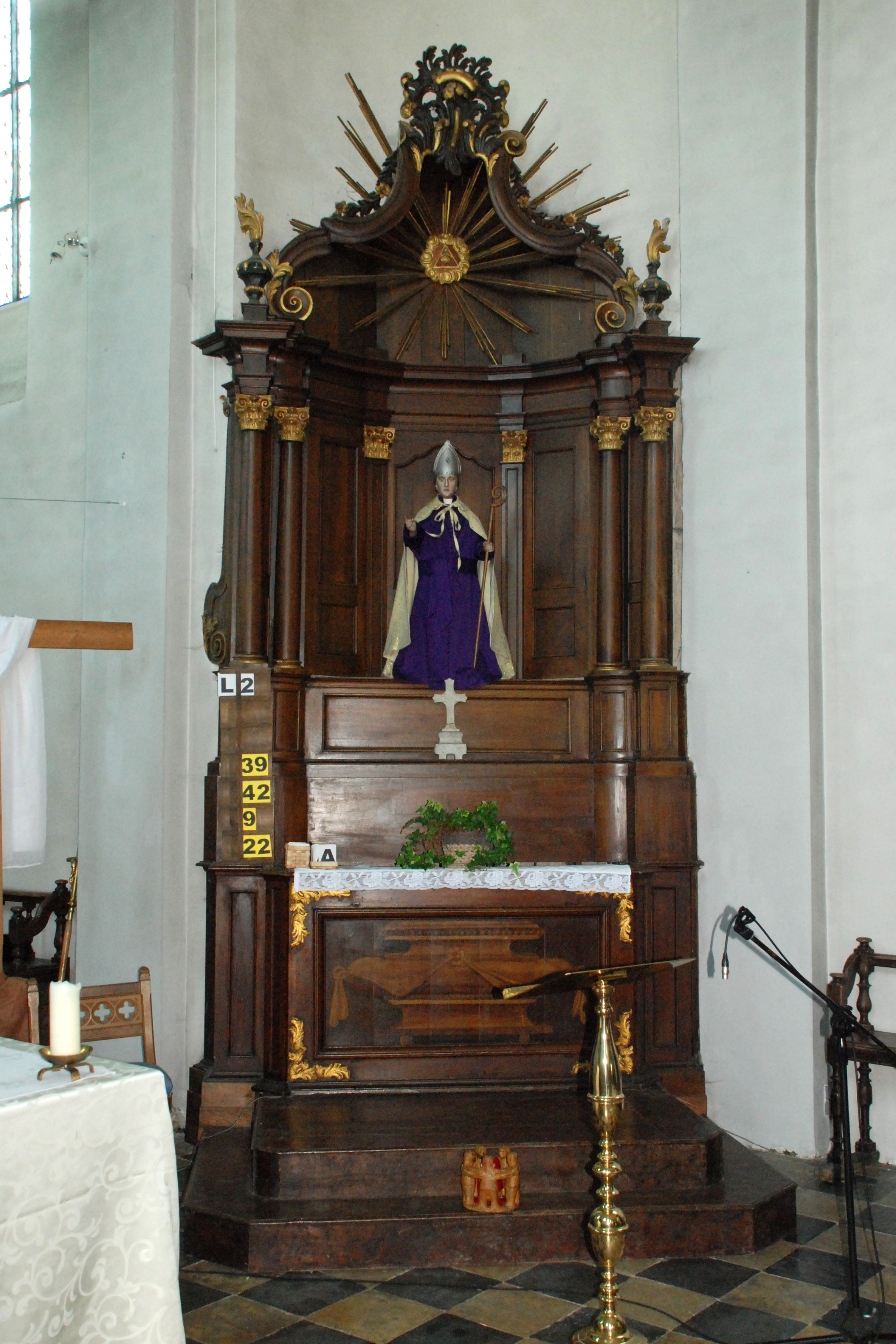 Belgique - Brabant wallon - Jodoigne - Saint-Remy-Geest - Église Saint-Remy